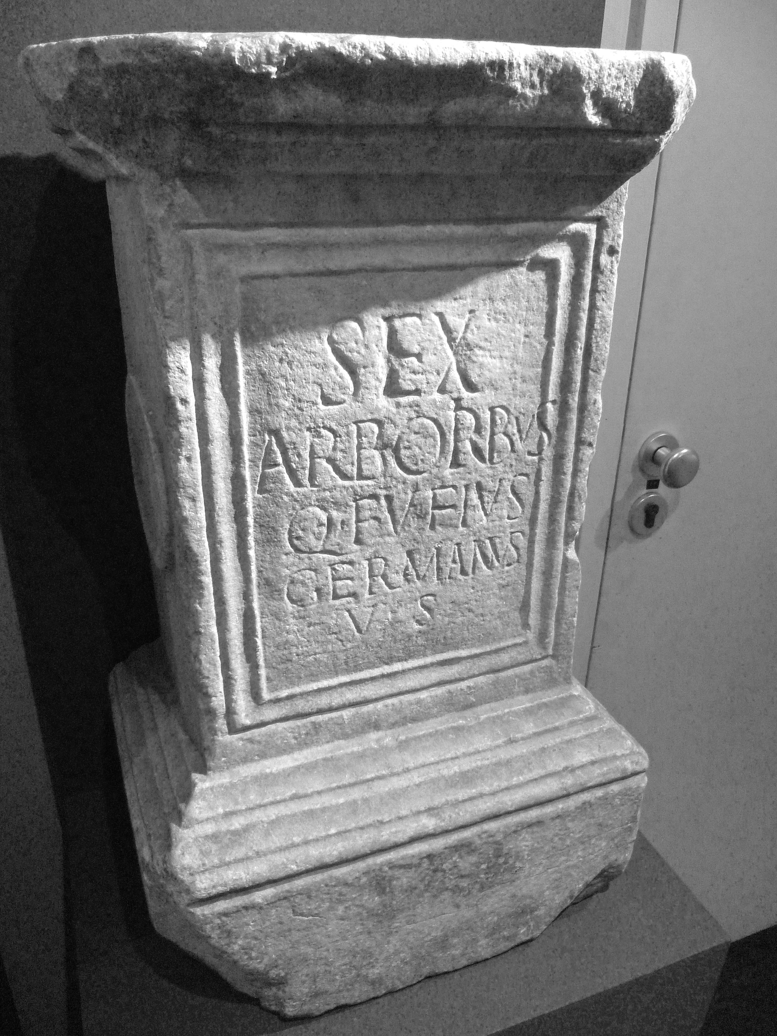 Autel votif datant de l'Empire romain, retrouvé à Arbas (Haute-Garonne, France). CIL XIII 129: Sex/arboribus/ Q(uintus) Fufius/ Germanus/ u(otum) s(oluit) Inv. 31019